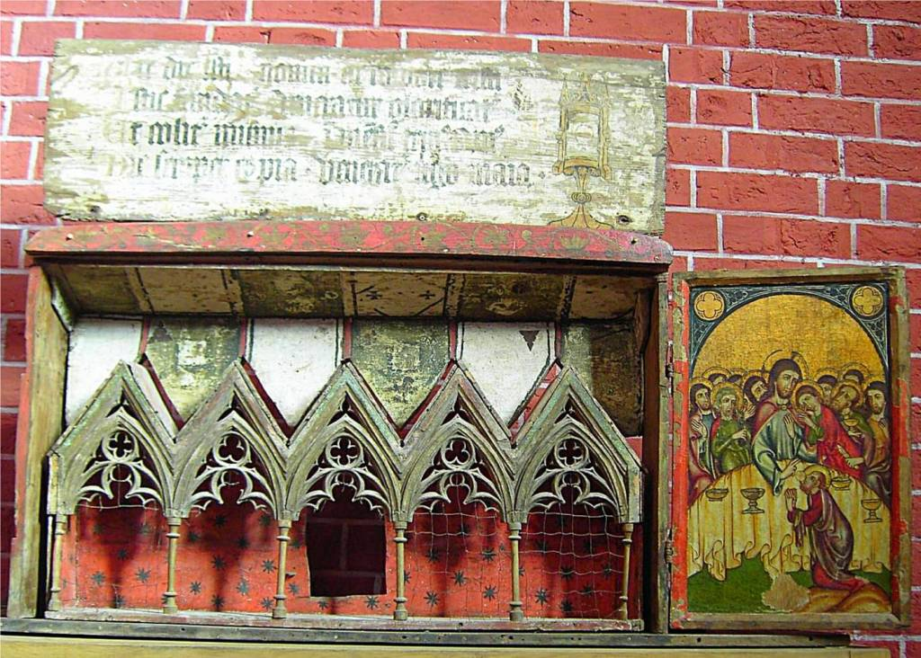 Corpus-Christi-Altar im Doberaner Münster (um 1340)